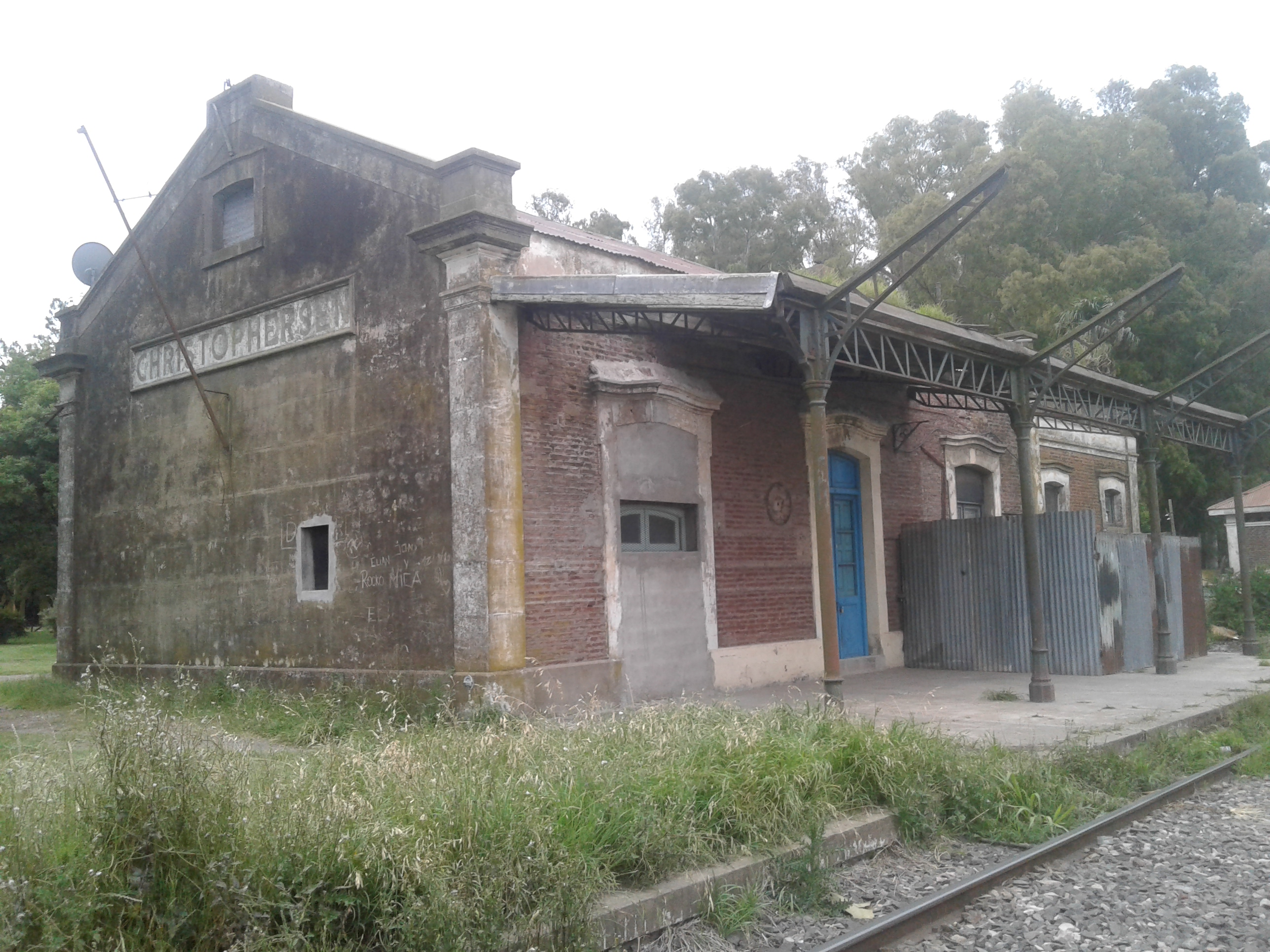 Estación de ferrocarril Christophersen, al sur de la Provincia de Santa Fe, Argentina.